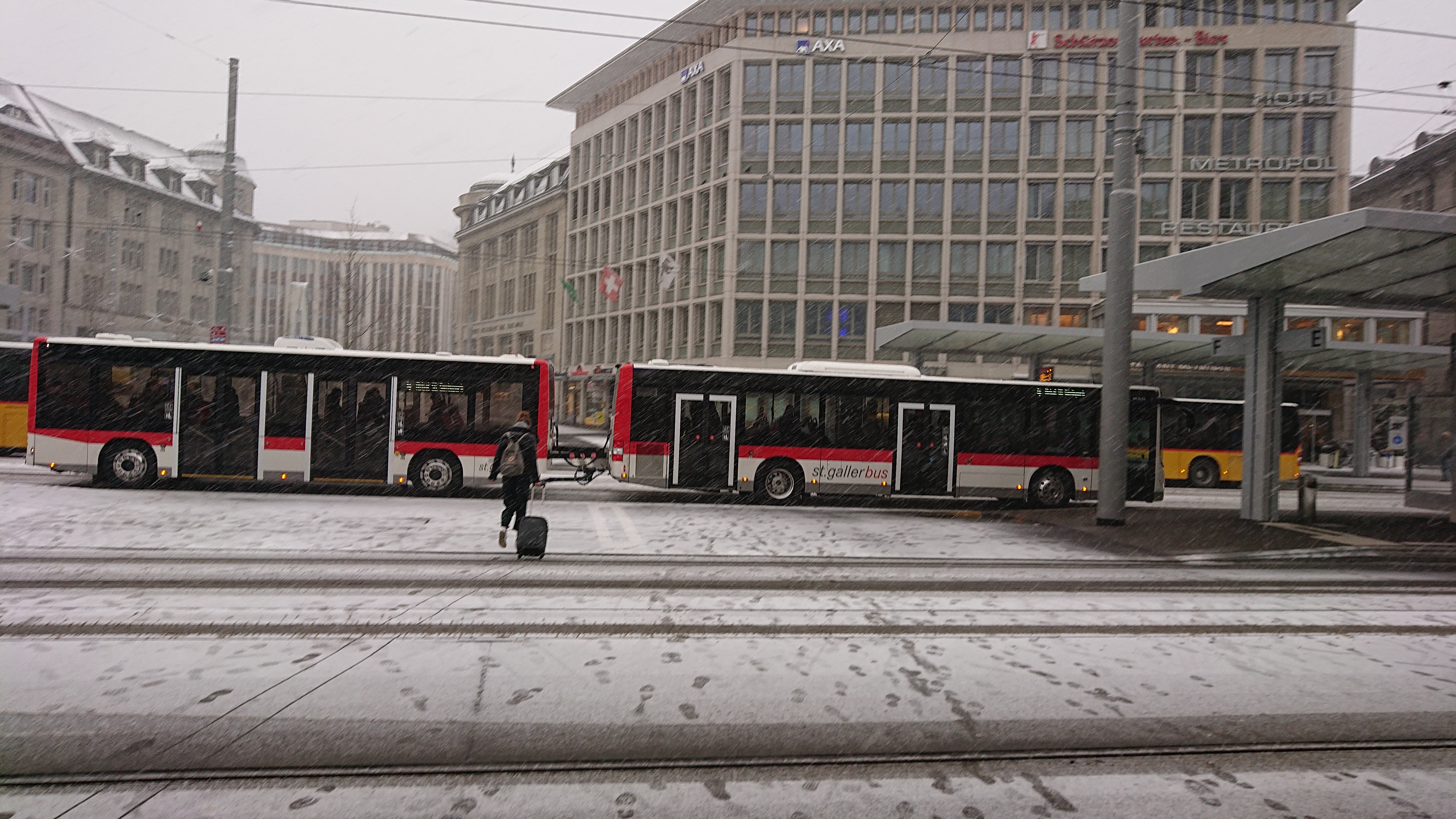 MAN Solobus Zweiachsig mit Anhänger als Buszug der VBSG im Einsatz seit 12/2018